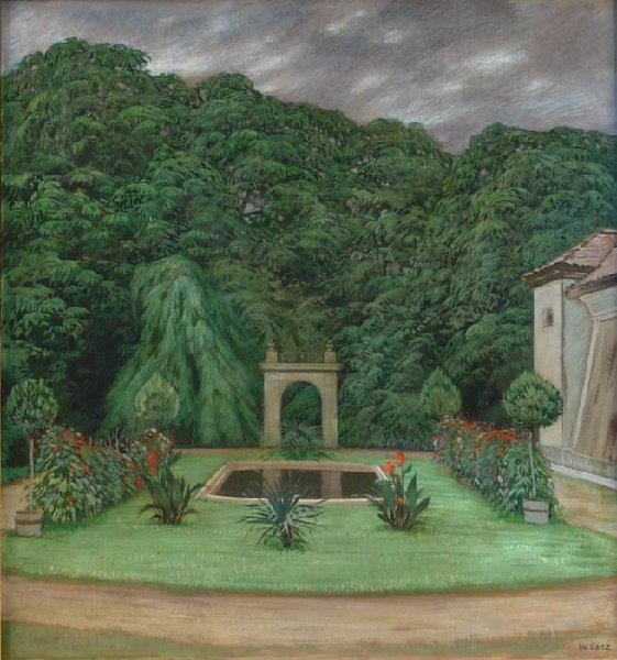 Vor dem Gewitter. Partie im Schloßpark bei aufziehendem Regen